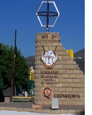 IsiXhosa: Hexagon